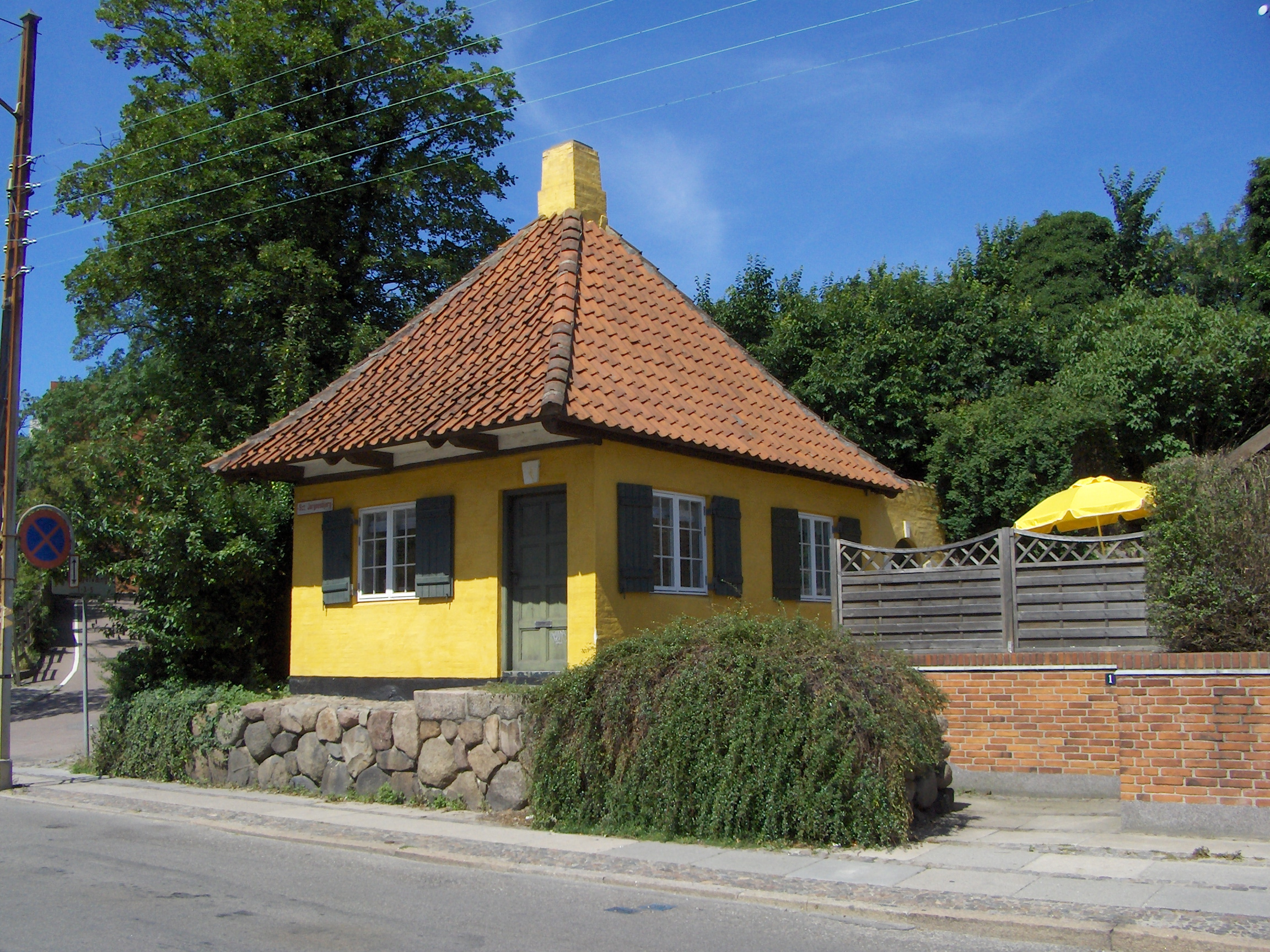 Accisebod på Sanct Jørgensbjerg 1 i Kalundborg